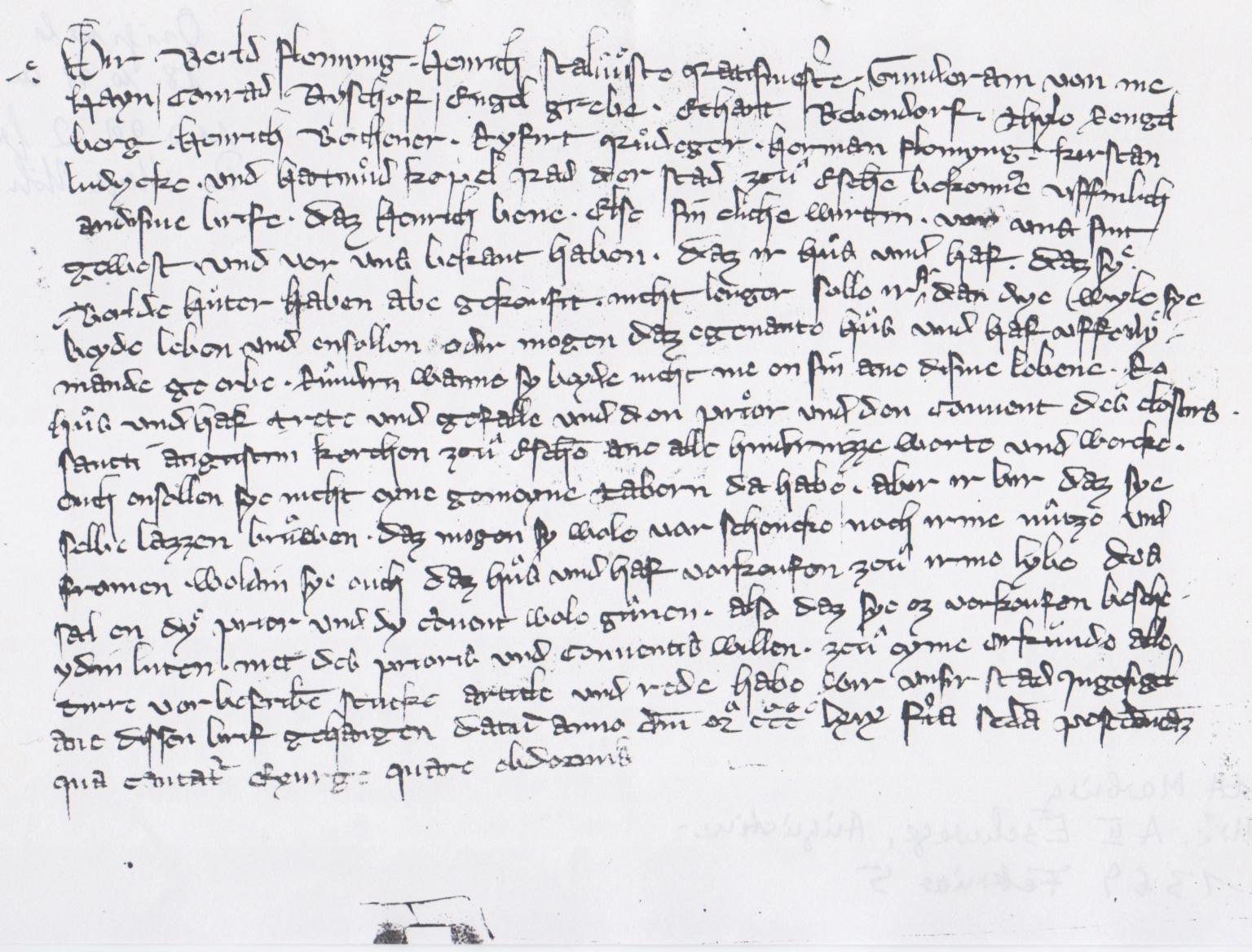 Urkunde befindet sich im Staatsarchiv Marburg